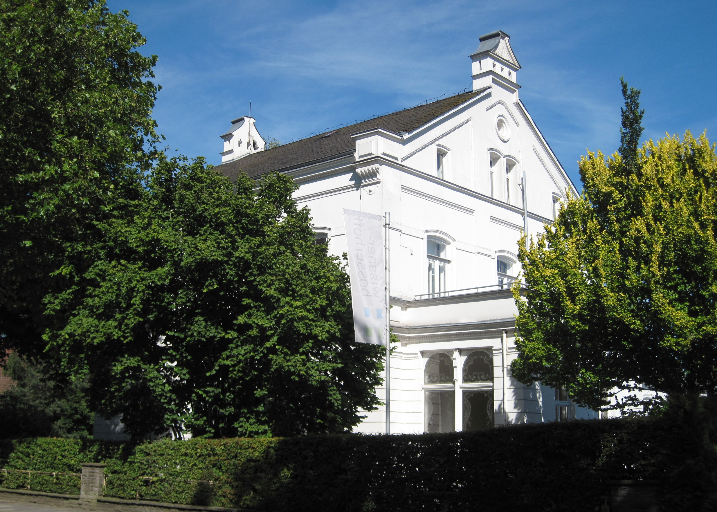 „Weiße Villa“ in Wickede (Ruhr), Hauptstraße 4. This image shows a heritage building in Germany, located in the North Rhine-Westphalian city Wickede (Ruhr) (no. 6).